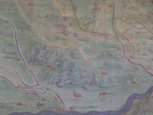 Questo affresco, presente nei musei Vaticani rappresenta una mappa medioevale della zona Lodigiana